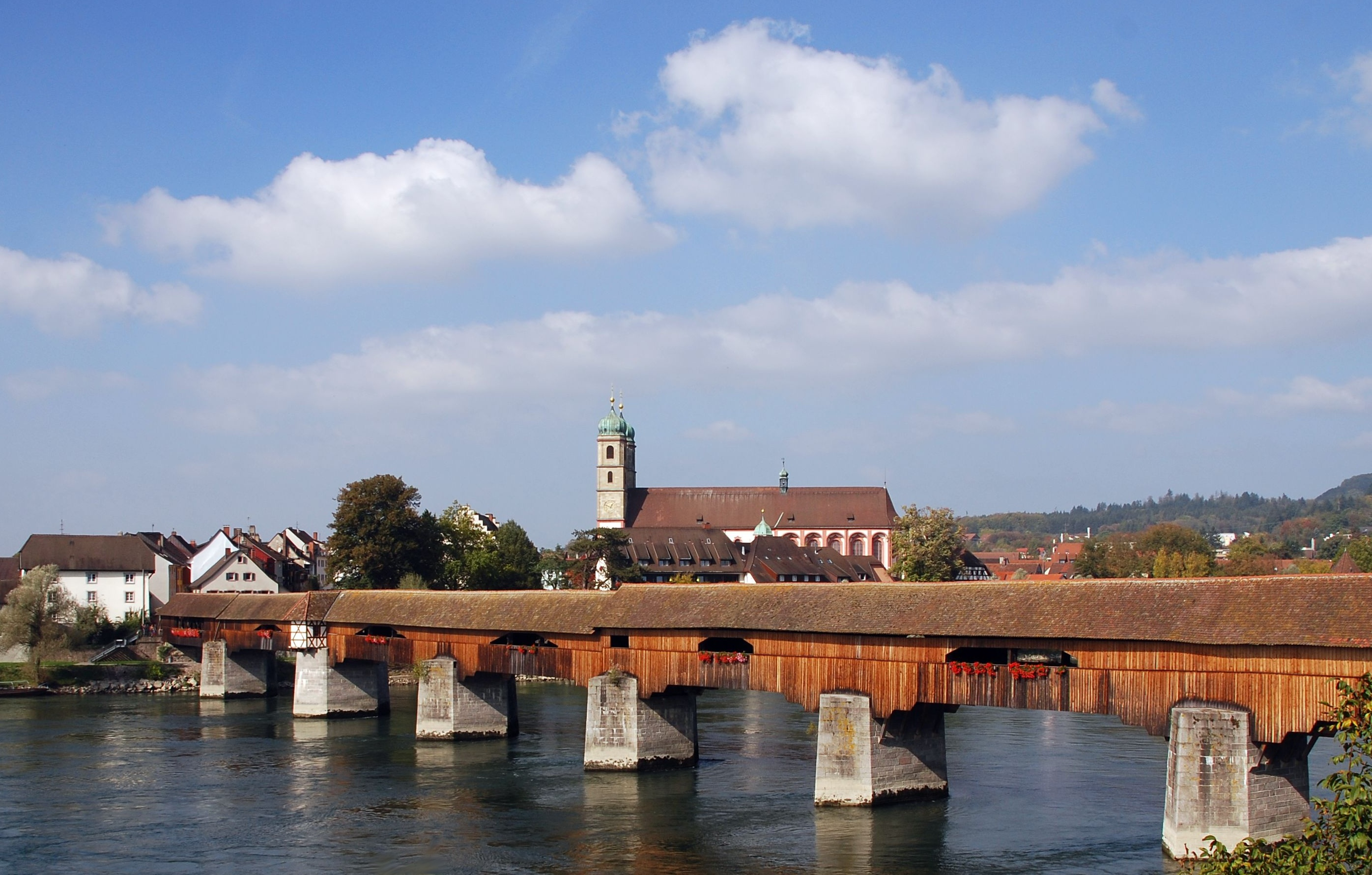 Holzbrücke Bad Säckingen von Stein aus gesehen, im Hintergrund das Fridolinsmünster